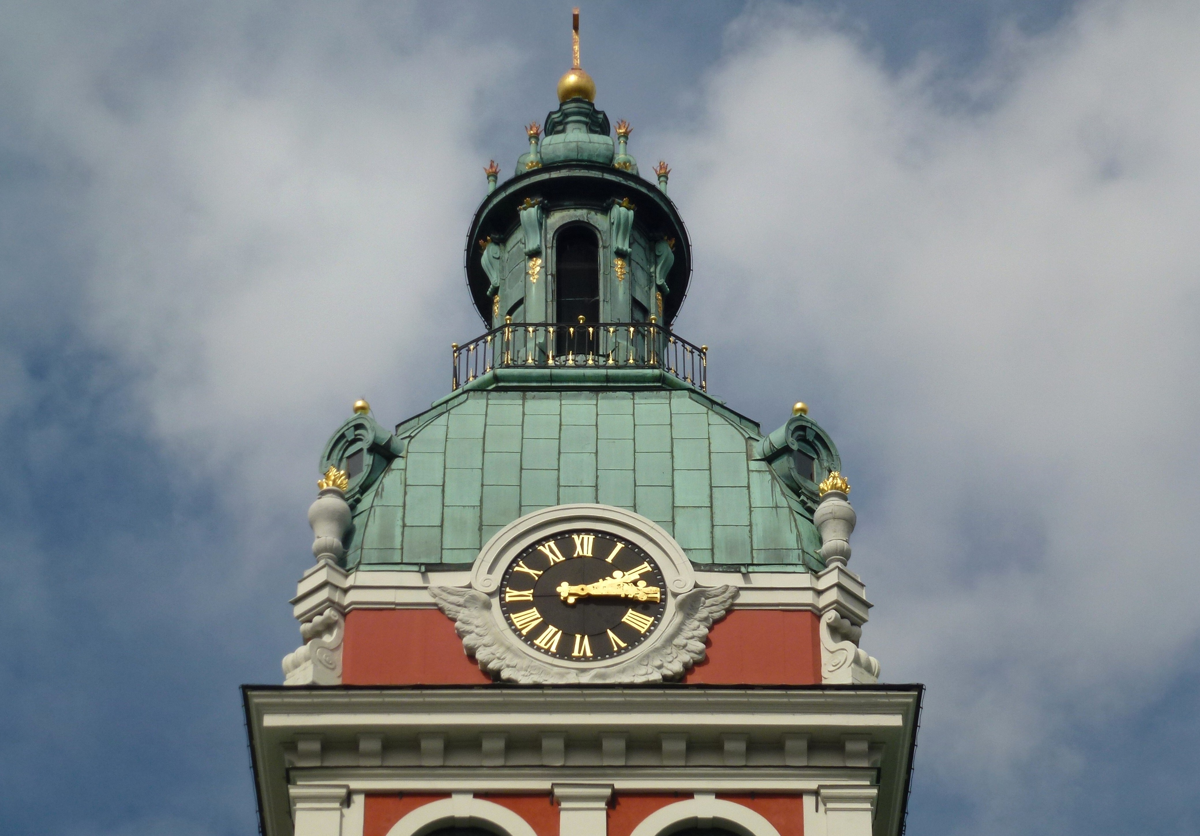 Sankt Jacobs kyrkas torn och tornur